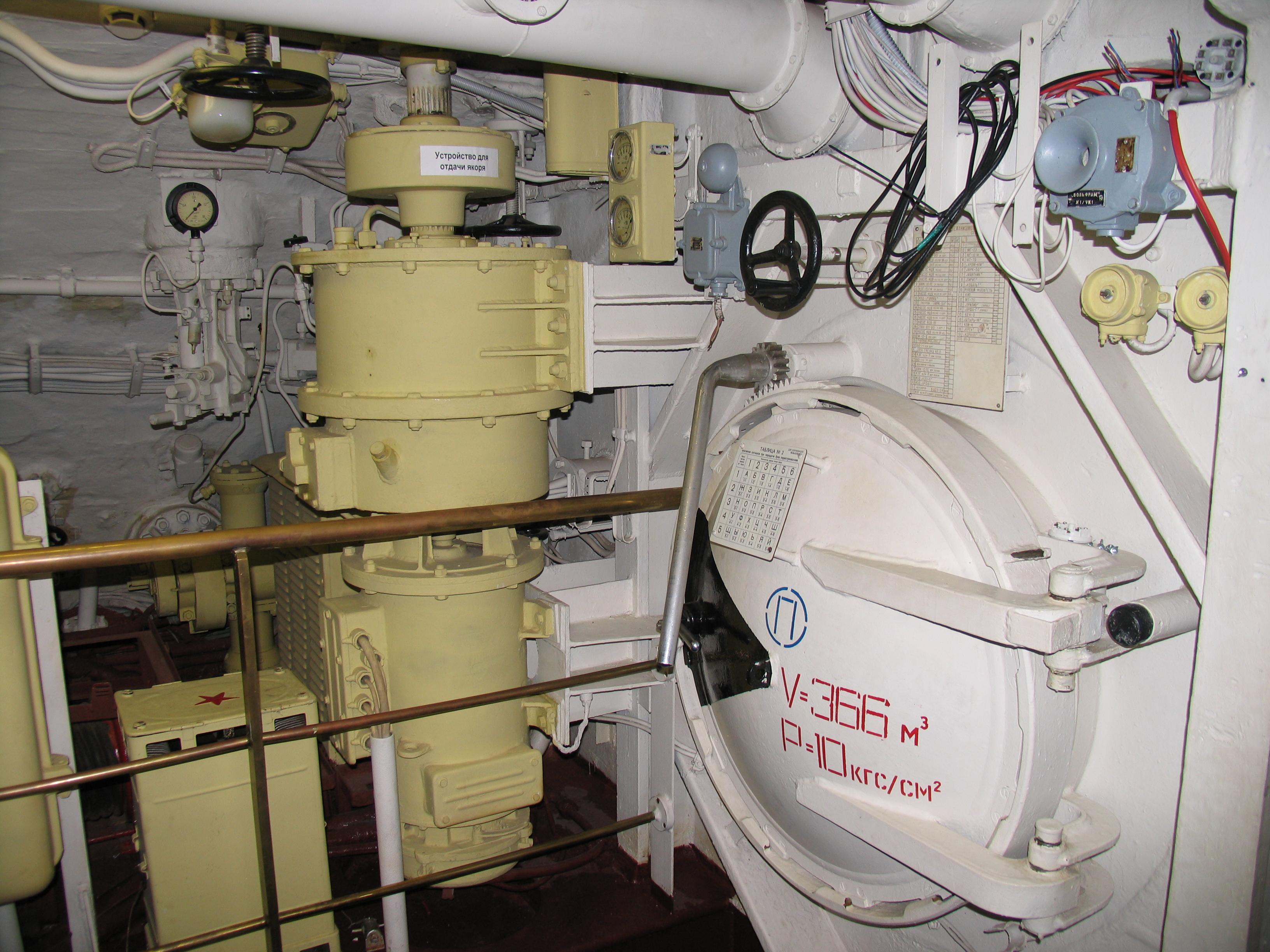 Подводная лодка Б-396. Второй отсек. Переборочная дверь между 1 и 2 отсеками. На двери таблица условных стуков. Слева якорный привод.